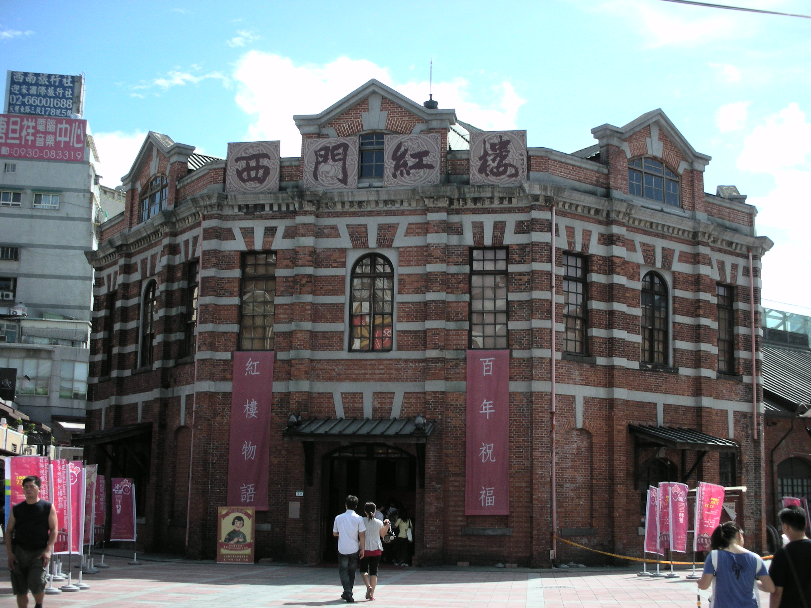 西門紅樓